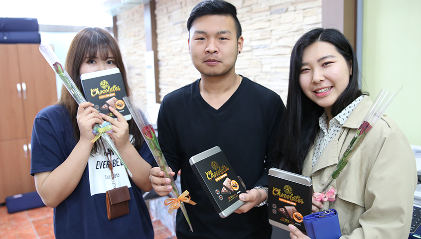 서울예술실용전문학교 성년의 날 EVENT!